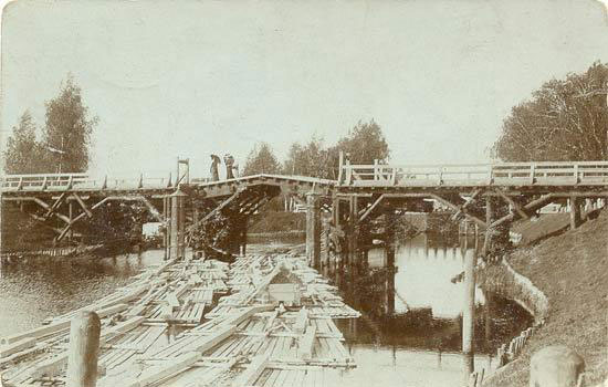 Беларуская (тарашкевіца): Лепель (Lepiel). Шлюз воднай сыстэмы Бярэзінскай (Biarezinskaja)